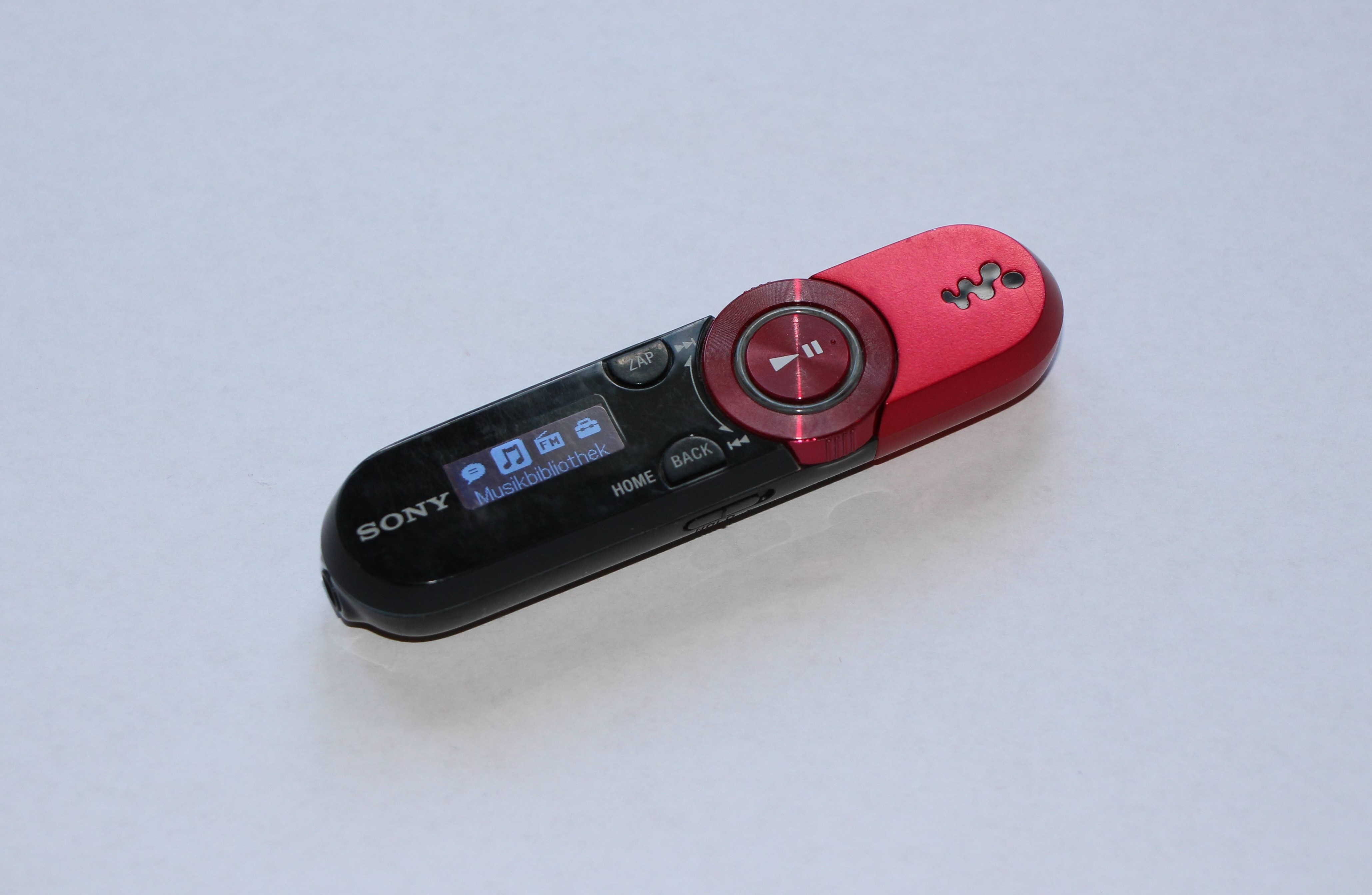 Siehe Kurzbeschreibung.